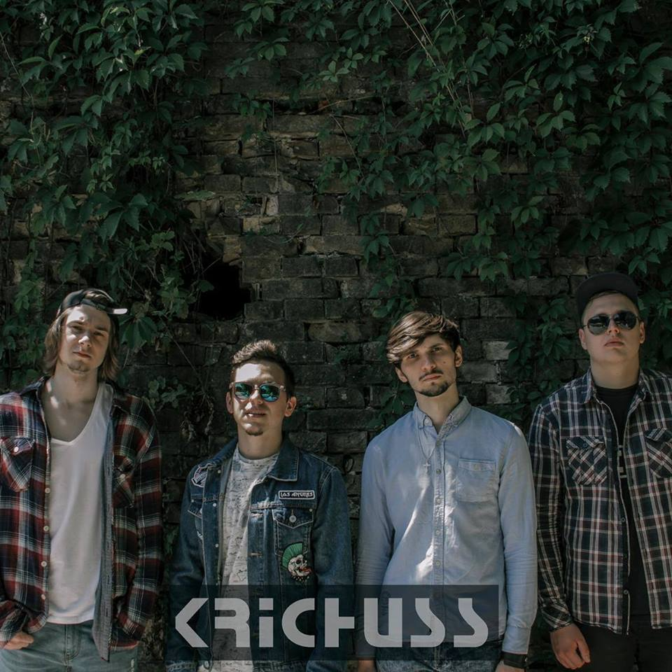 Український музичний гурт у місті Києві - Krichuss (2018р).jpg